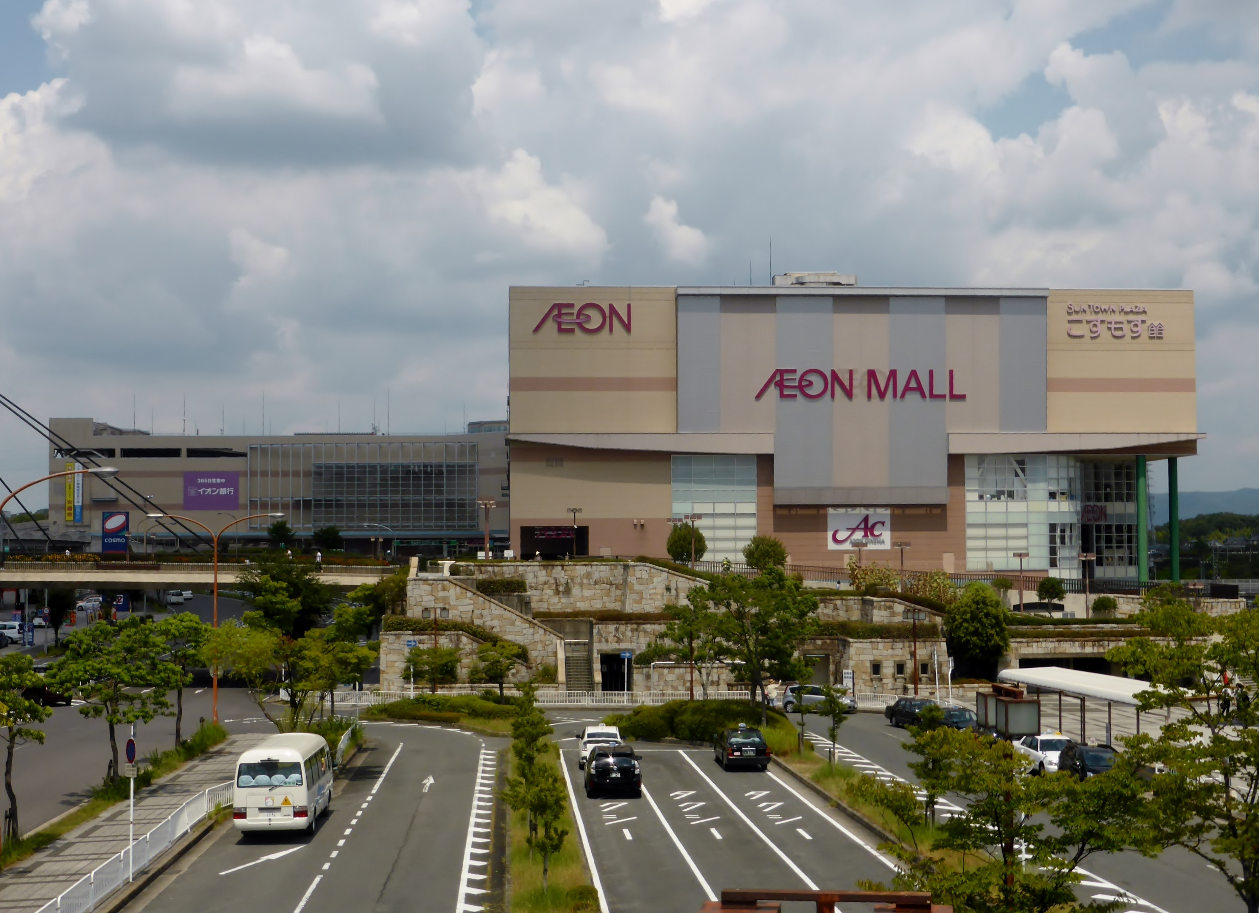 イオンモール高の原を撮影。